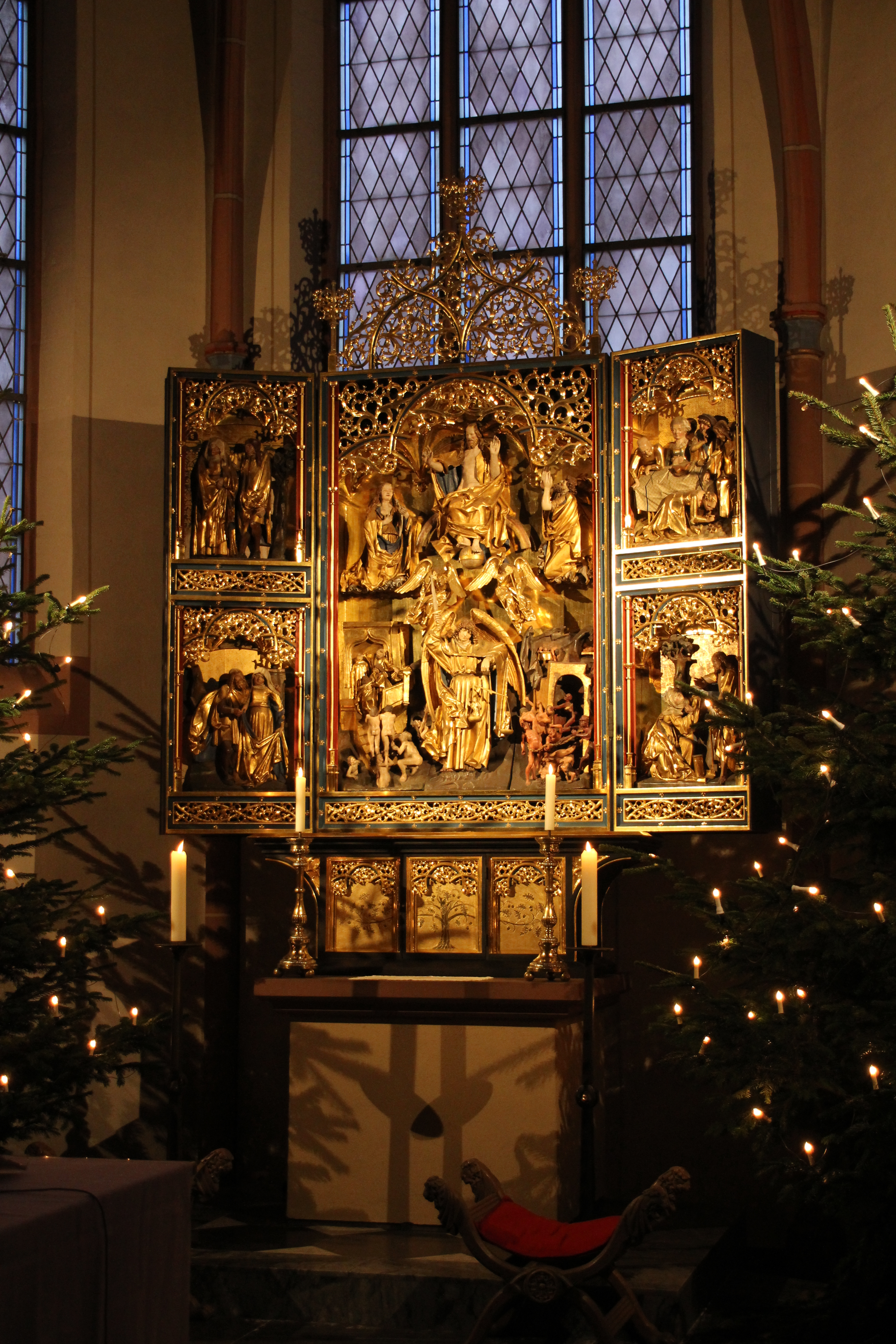 Gotischer Hochaltar in der Pfarrkirche St. Michael in Lendersdorf.